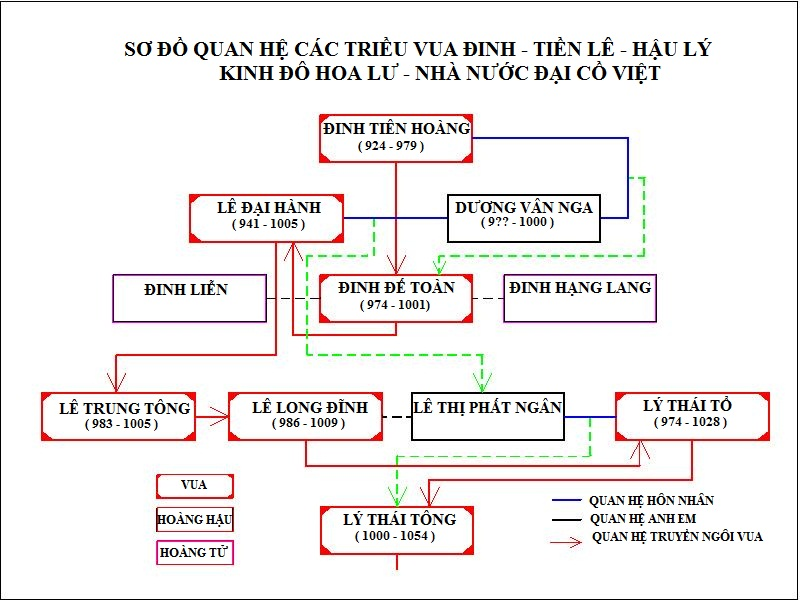 Phả hệ các triều Vua ở Hoa Lư